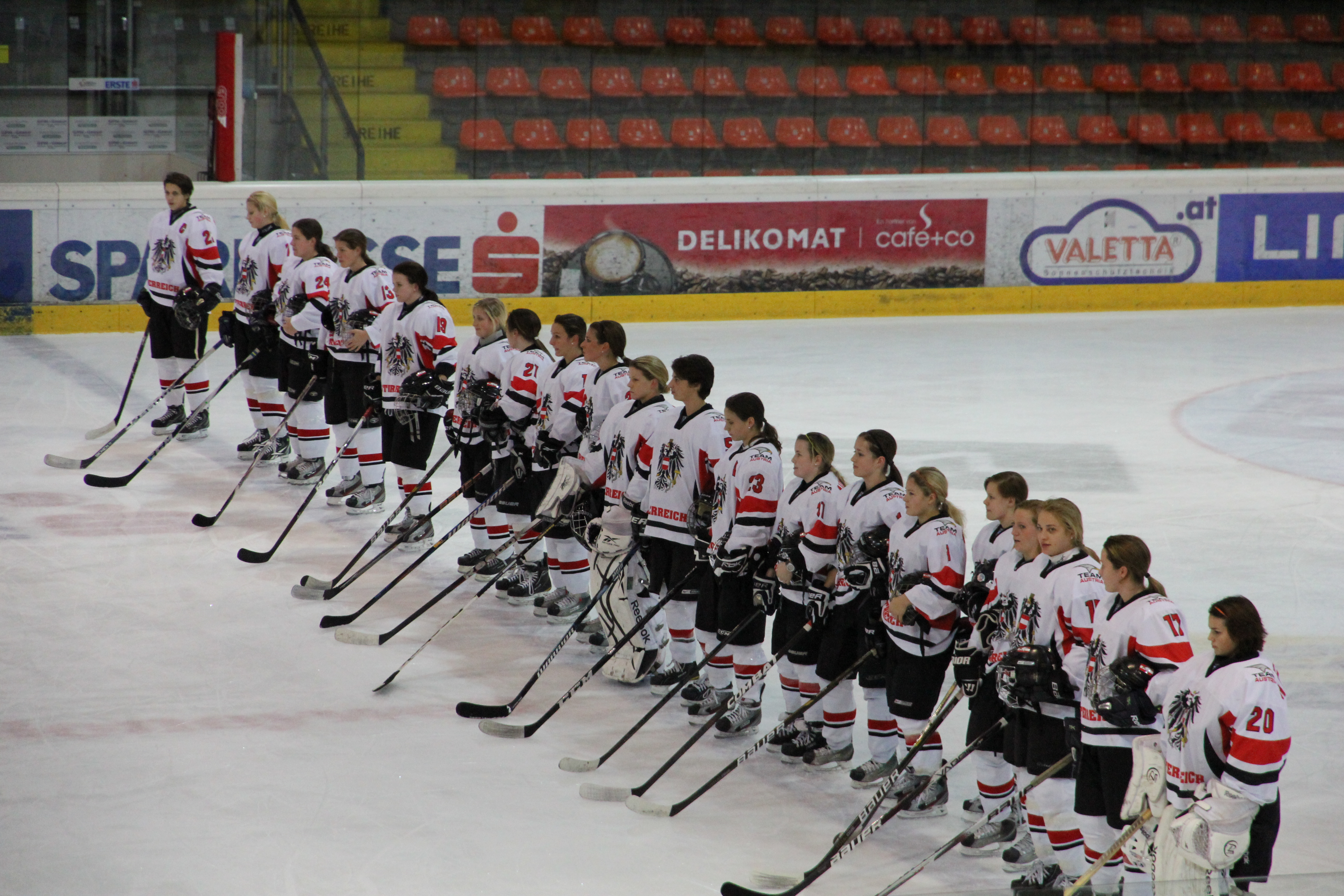 Österreichische Eishockeynationalmannschaft der Frauen beim Lineup vor dem Spiel gegen die U20/U17-Formation der Black Wings Linz im Rahmen eines vorbereitenden Freundschaftsspiels vor der Olympiaqualifikation 2013.